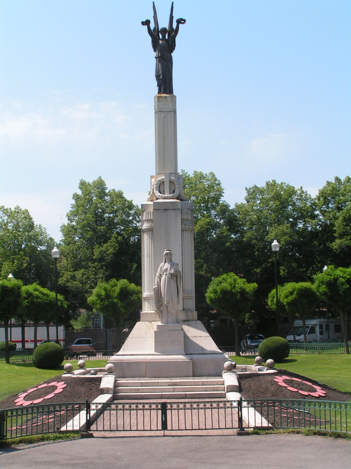 Sarrguemines - A Nos Morts